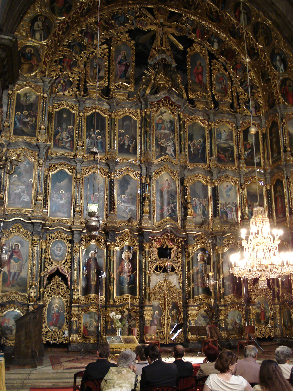 Gör. kel. templom (Miskolc, Deák Ferenc-tér 7.) This is a photo of a monument in Hungary. Identifier: 2935